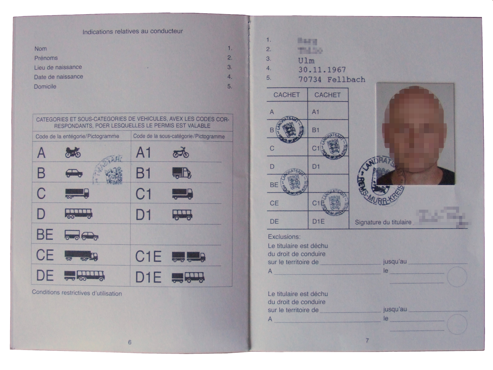 Internationaler Fuehrerschein, Seite 6/7